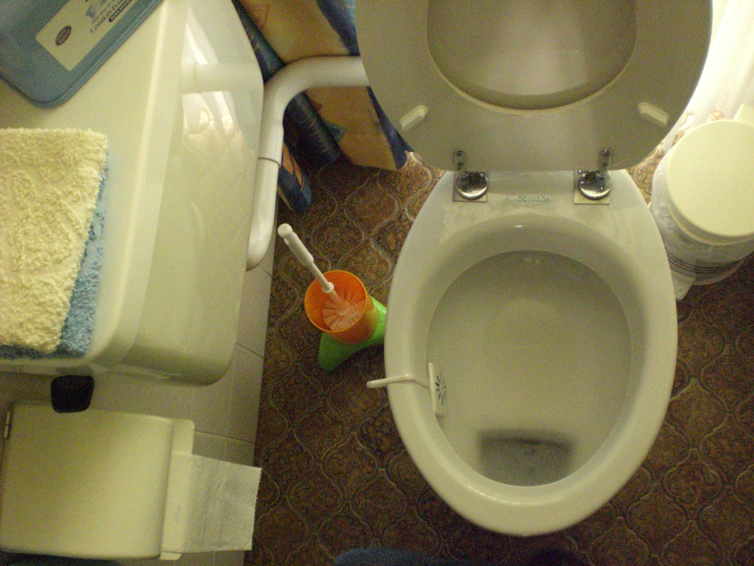 Toilette in der Flachspülvariante mit nicht-wassersparendem Spülkasten